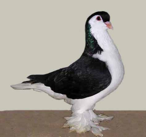 Lahore Pigeon (Black)